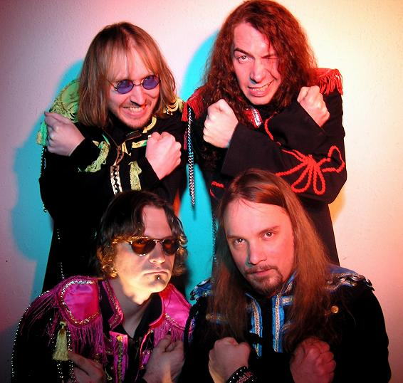 Beatallica in 2006